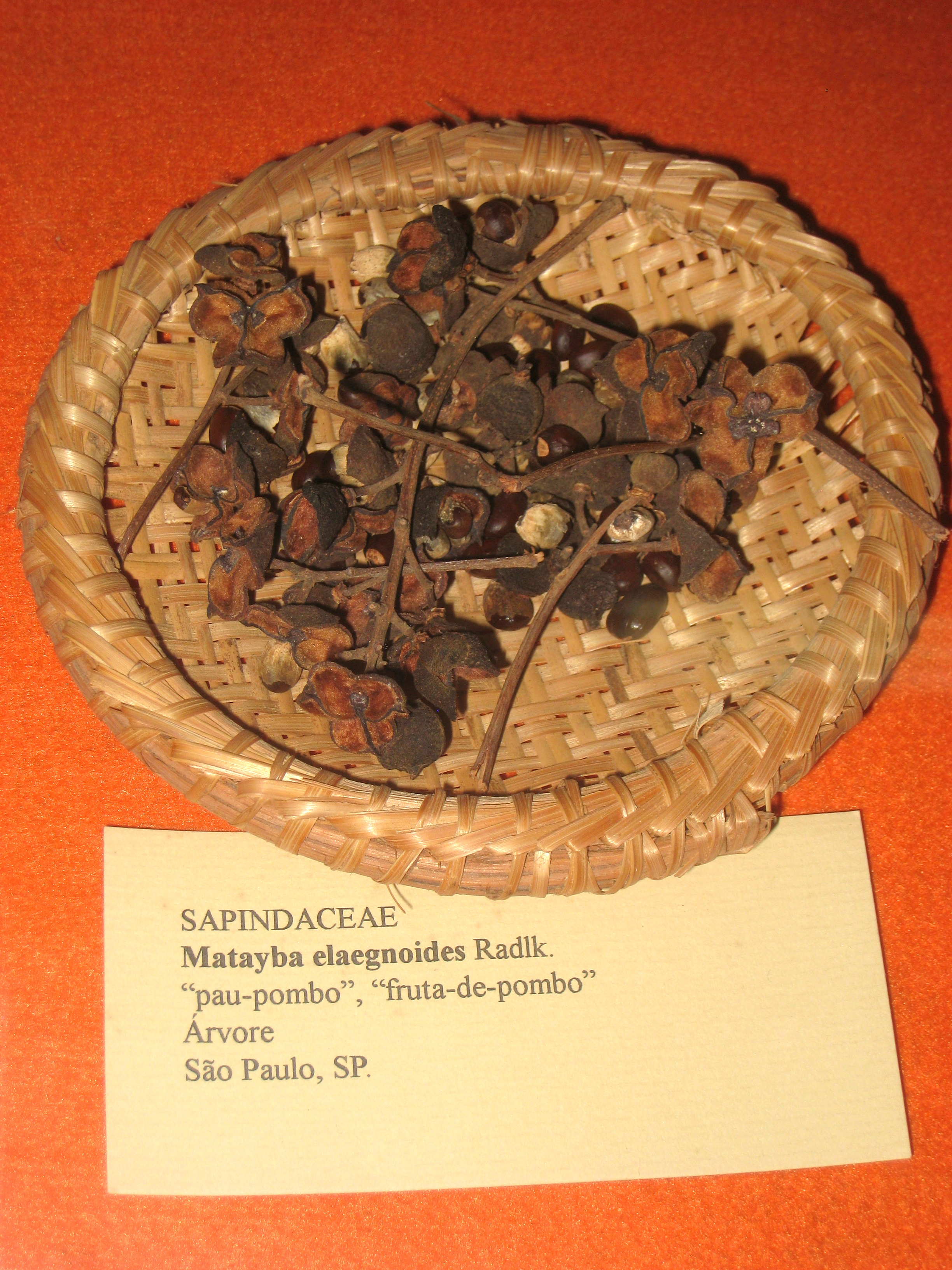 Matayba elaeagnoides specimen in the Museu Botânico Dr. João Barbosa Rodrigues, Jardim Botânico de São Paulo, São Paulo City, SP, Brazil.